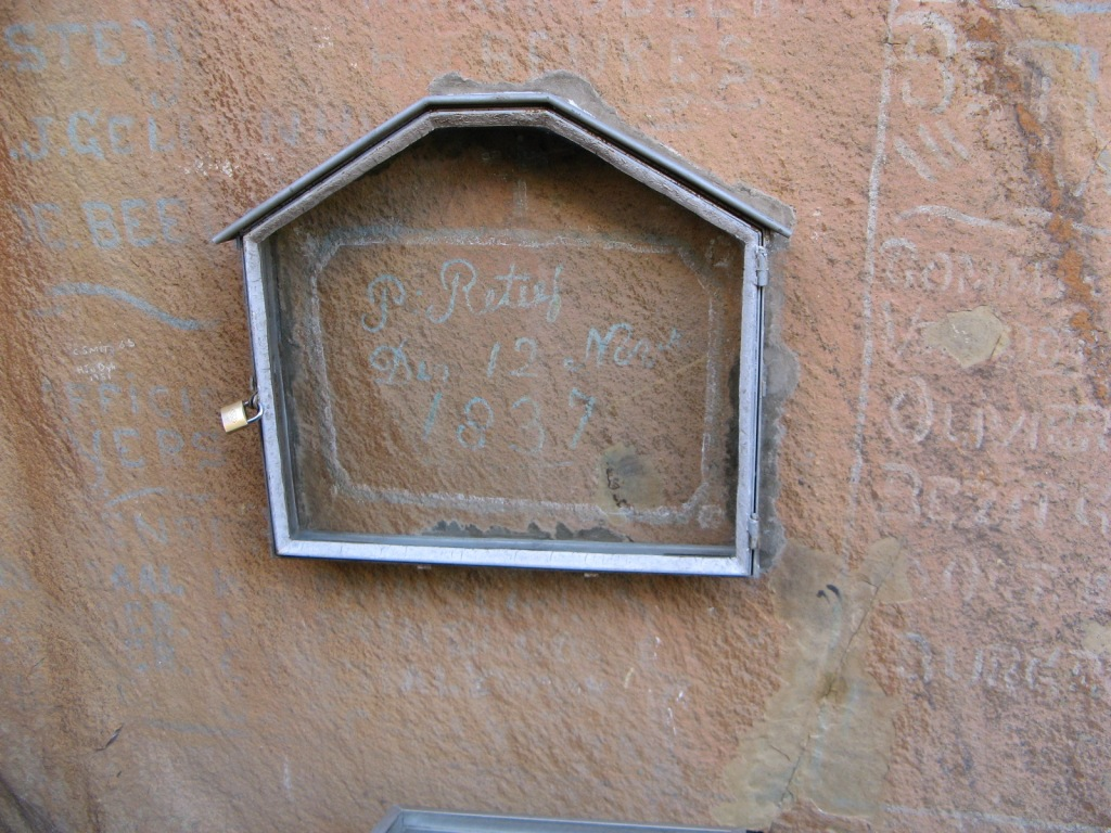 Retiefklip te Kerkenberg, oos-Vrystaat This media shows a South African Protected Site with SAHRA file reference 9/2/316/0014.